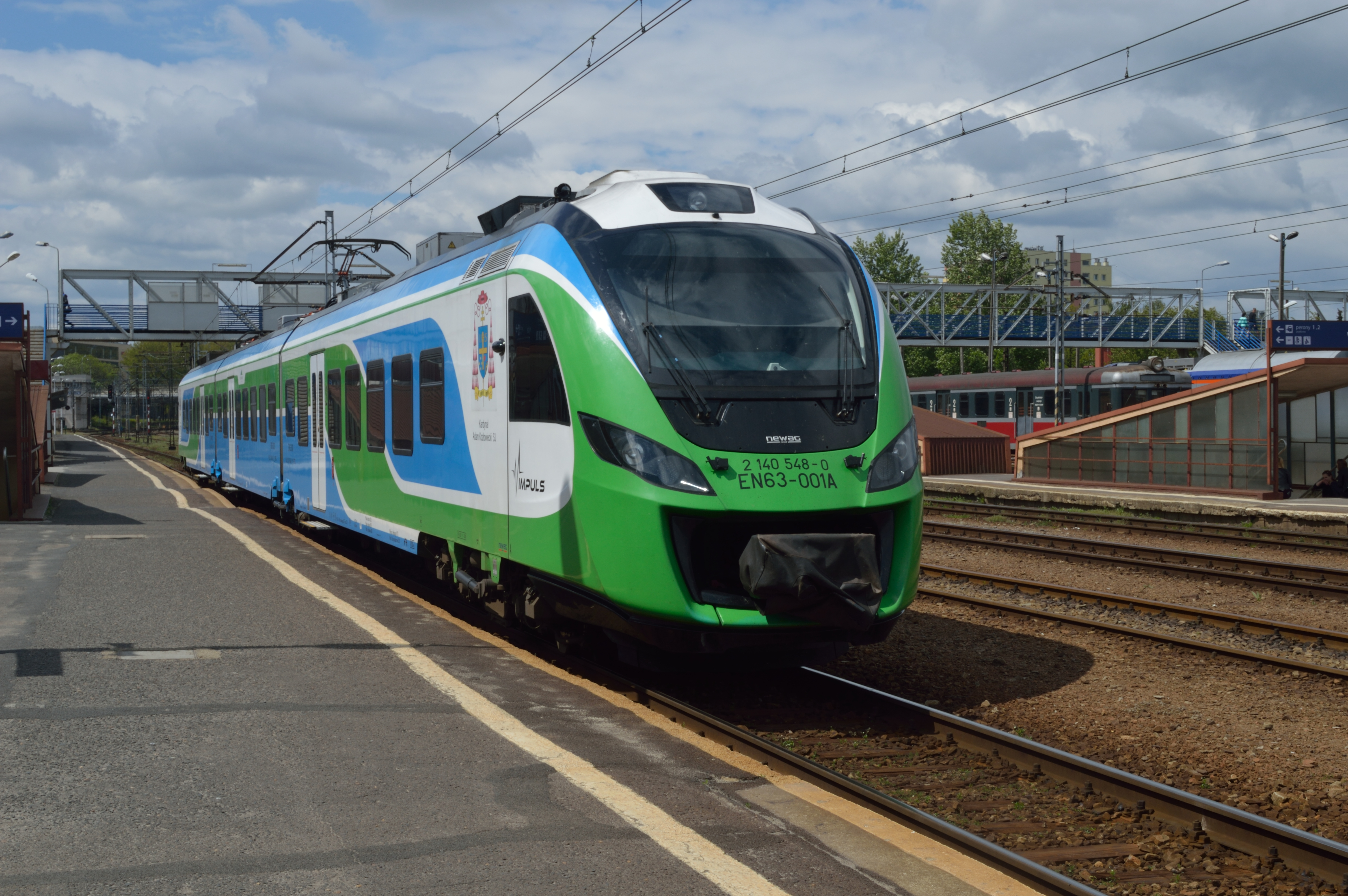 Seen in between duties at Rzeszów Główny on 7 May 2016 is Przewozy Regionalne owned EMU EN63-001.